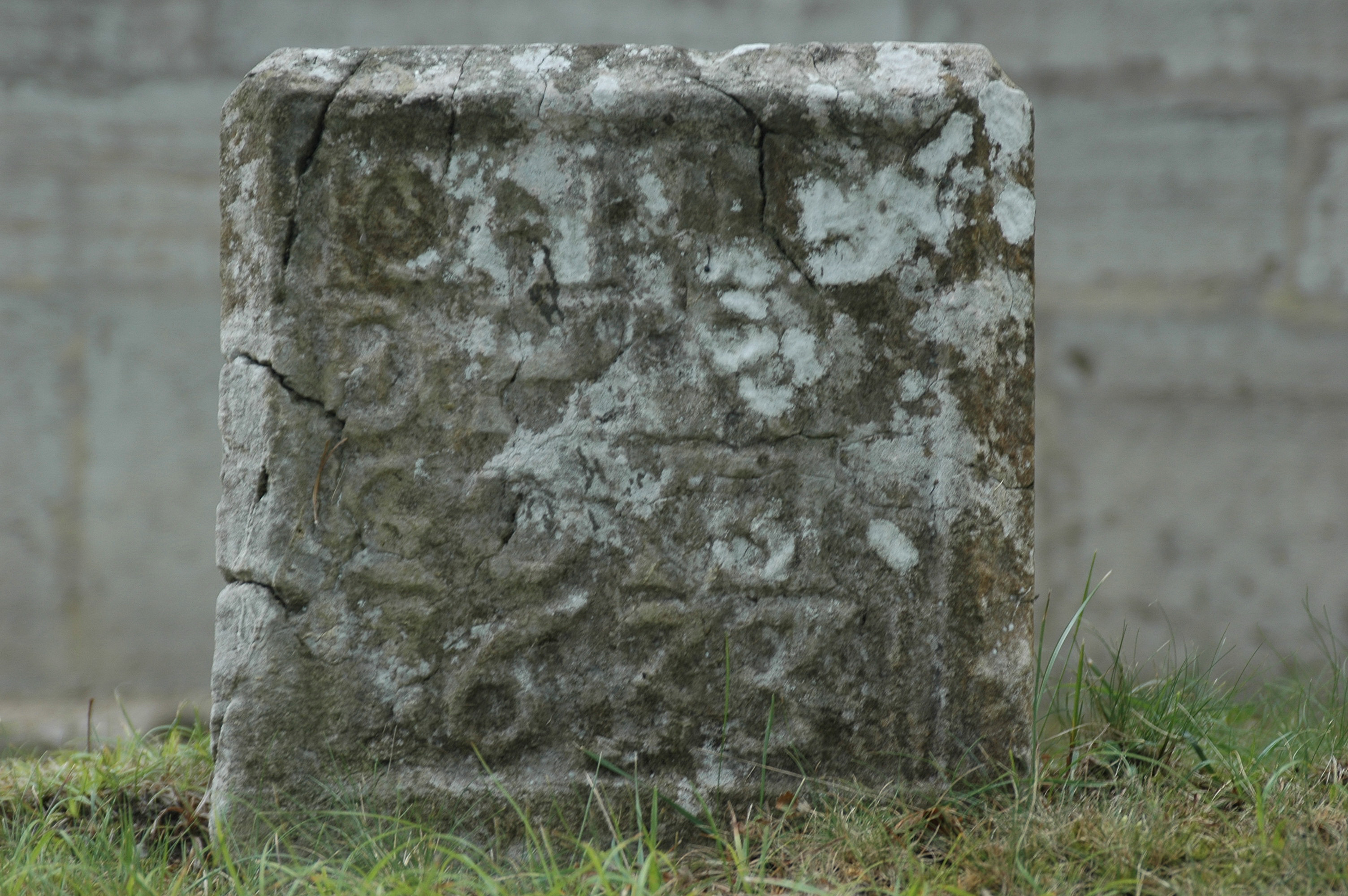 Larressore, stèle tabulaire. Photo prise le 08/08/06 par Harrieta171